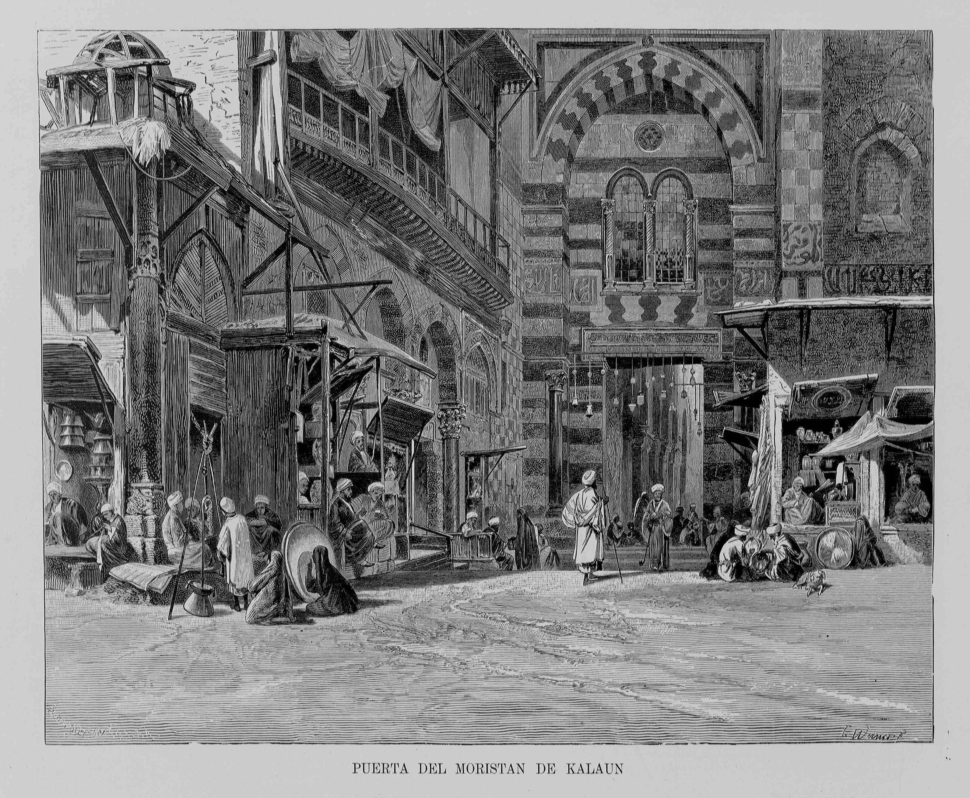 Autor: Ebers, Georg Moritz, 1837-1898 Descripción bibliográfica: Egipto / por Jorge Ebers ; traducción directa del alemán por Antonio Bergnes de las Casas, revisada y corregida por Cayetano Vidal de Valenciano. - Ed. monumental ilustrada con 650 grabados ... del reputado pintor Cárlos Werner. - Barcelona : Espasa y Compañía, 1882?. - 2 v. (X, 408, [1] p., [14] h. de lám. ; 438, [1] p., [14] h. de lám.). : il. ; 40 cm Materia: Egipto - Historia Materia: Egipto - Descripciones y viajes - Siglo 19 Notas: Palau, t. 5, p. 1, lo fecha de manera aproximada en 1882. - Port. a dos tintas. - Antep. - Ilustrada con 650 grabados intercalados en el texto y enriquecida con dos cartas geográficas tirada a tres tintas, una portada en colores y 24 magnificas imitaciones de las artísticas acuarelas del pintor Carlos Weiner Traductor:Bergnes de las Casas, Antonio, 1801-1879 Ilustrador:Werner, Karl, 1821-1888, il. Localización: Libro completo